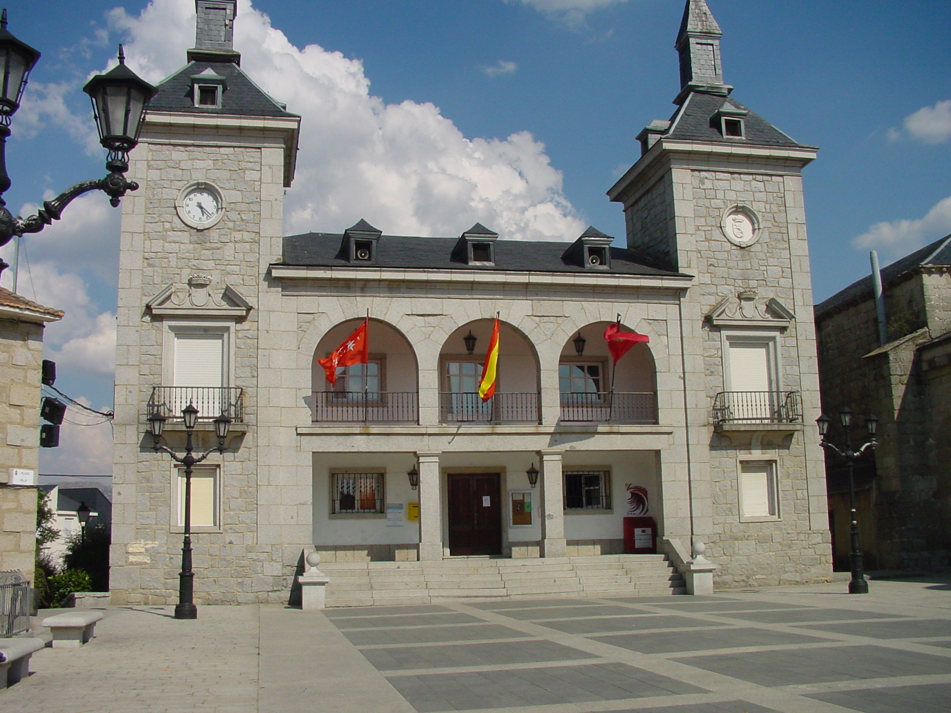 Ayuntamiento de Alpedrete.